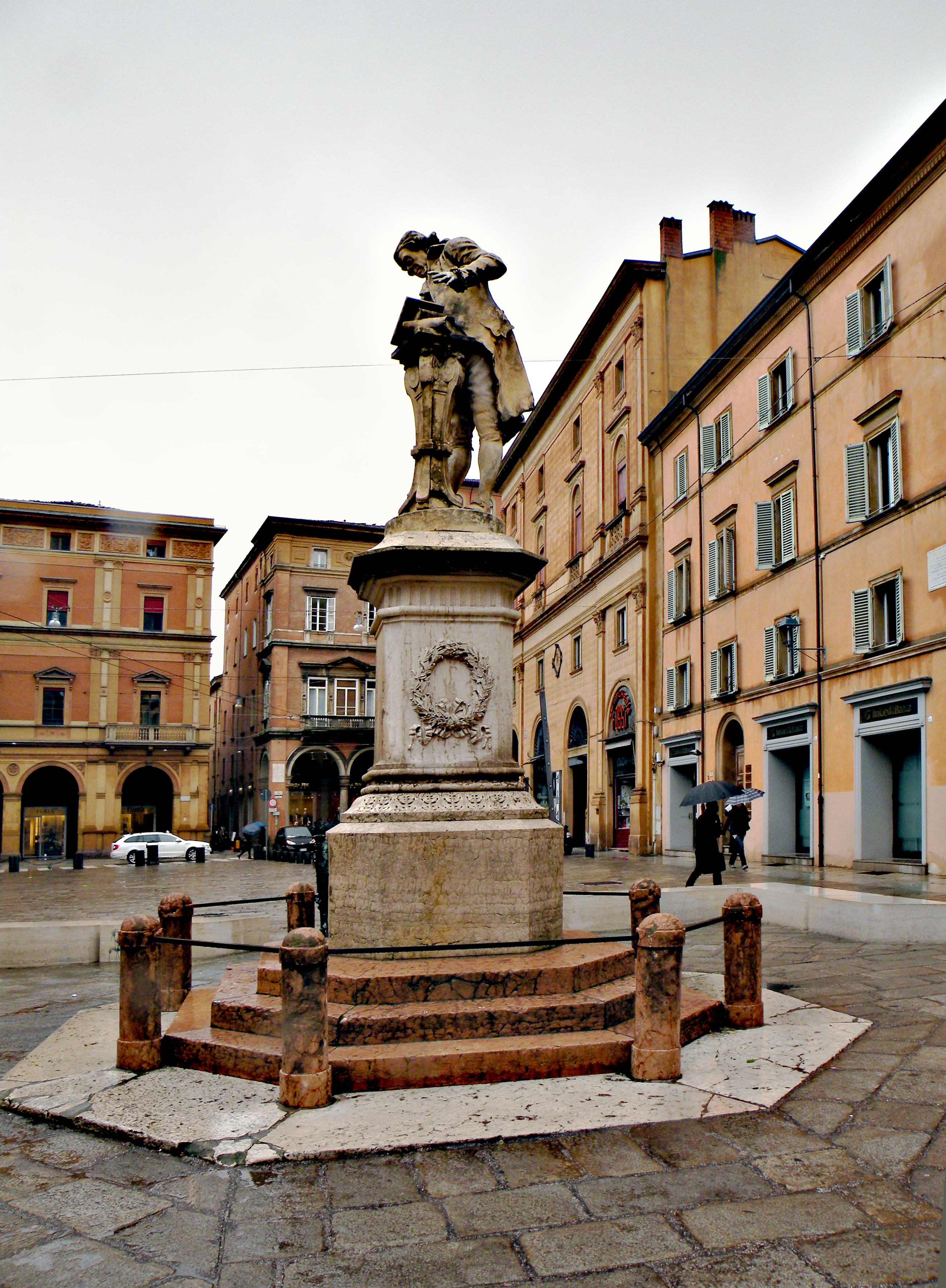 Памятник Гальвани в Болонье